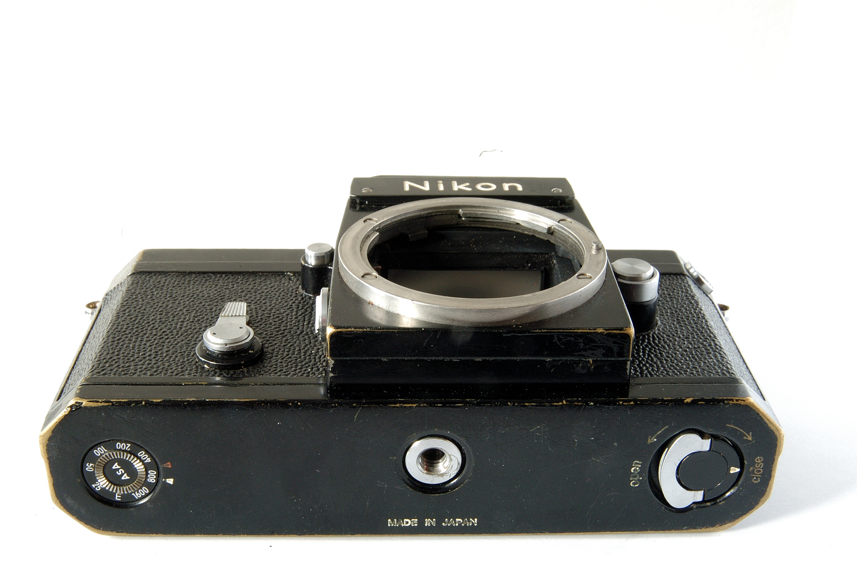 Nikon F